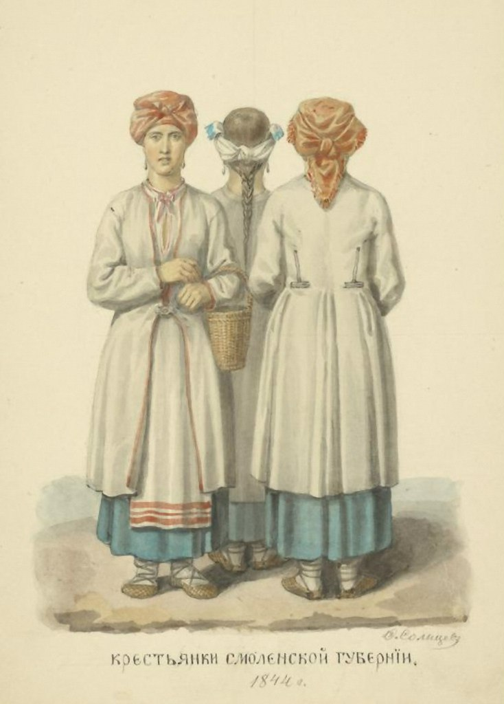 Солнцев Ф. Г. Крестьянки Смоленской губернии, 1844 год. «Одежды Русского государства».